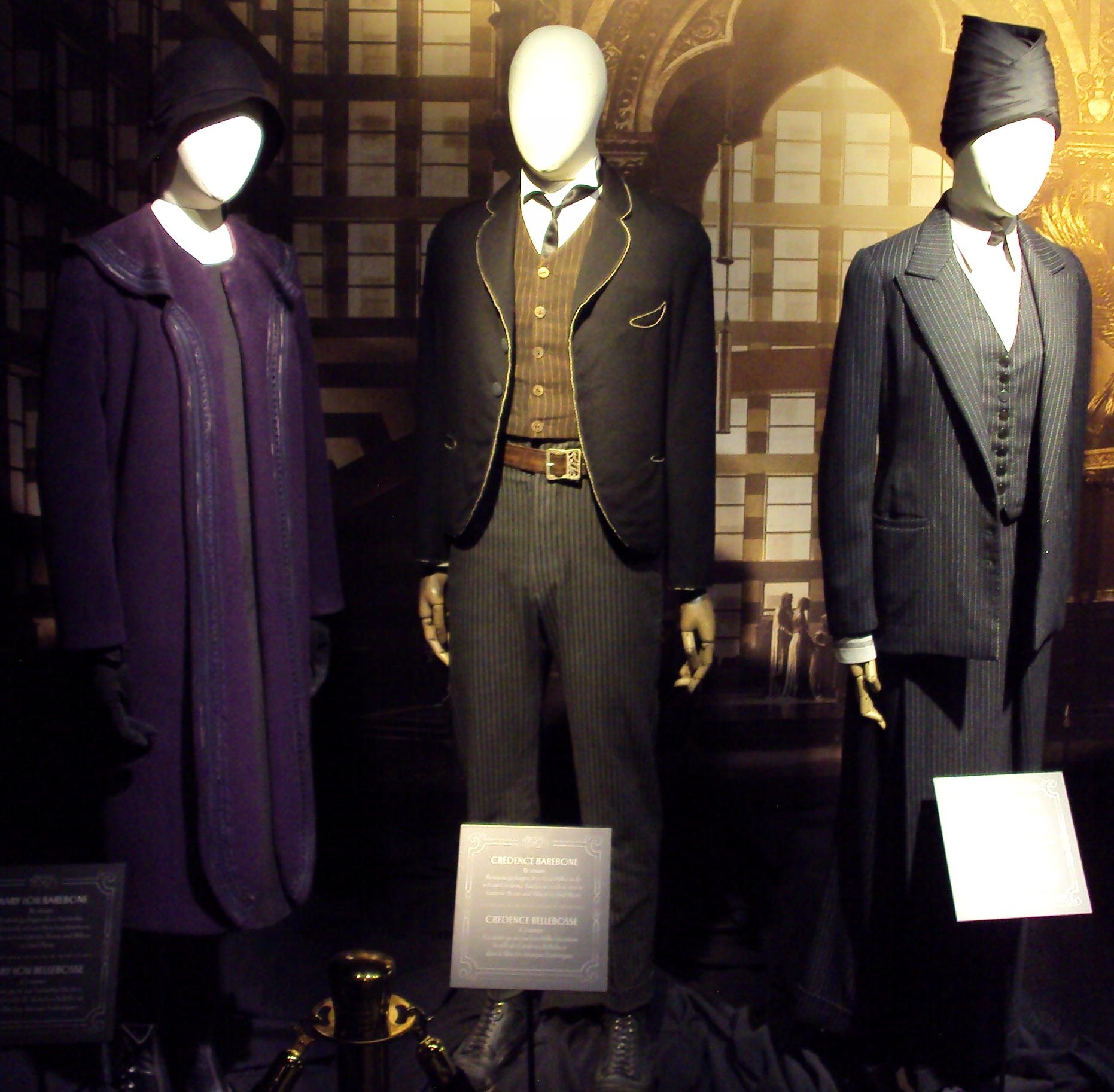 Kostuums van (van links naar rechts) Mary Lou Barebone, Credence Barebone en Seraphina Picquery uit de film Fantastic Beasts and Where to Find Them tijdens Harry Potter: The Exhibition in Brussel (België)